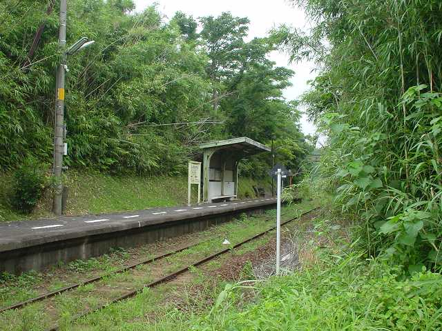 頴娃大川駅（2005年7月投稿者が撮影）